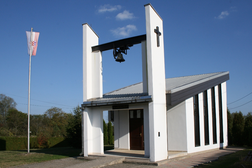 Kapela Sv. Križa, podignuta u spomen poginulim braniteljima 129. brigade HV u Draganiću